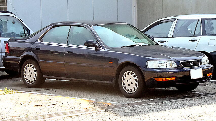 初代ホンダ・セイバー